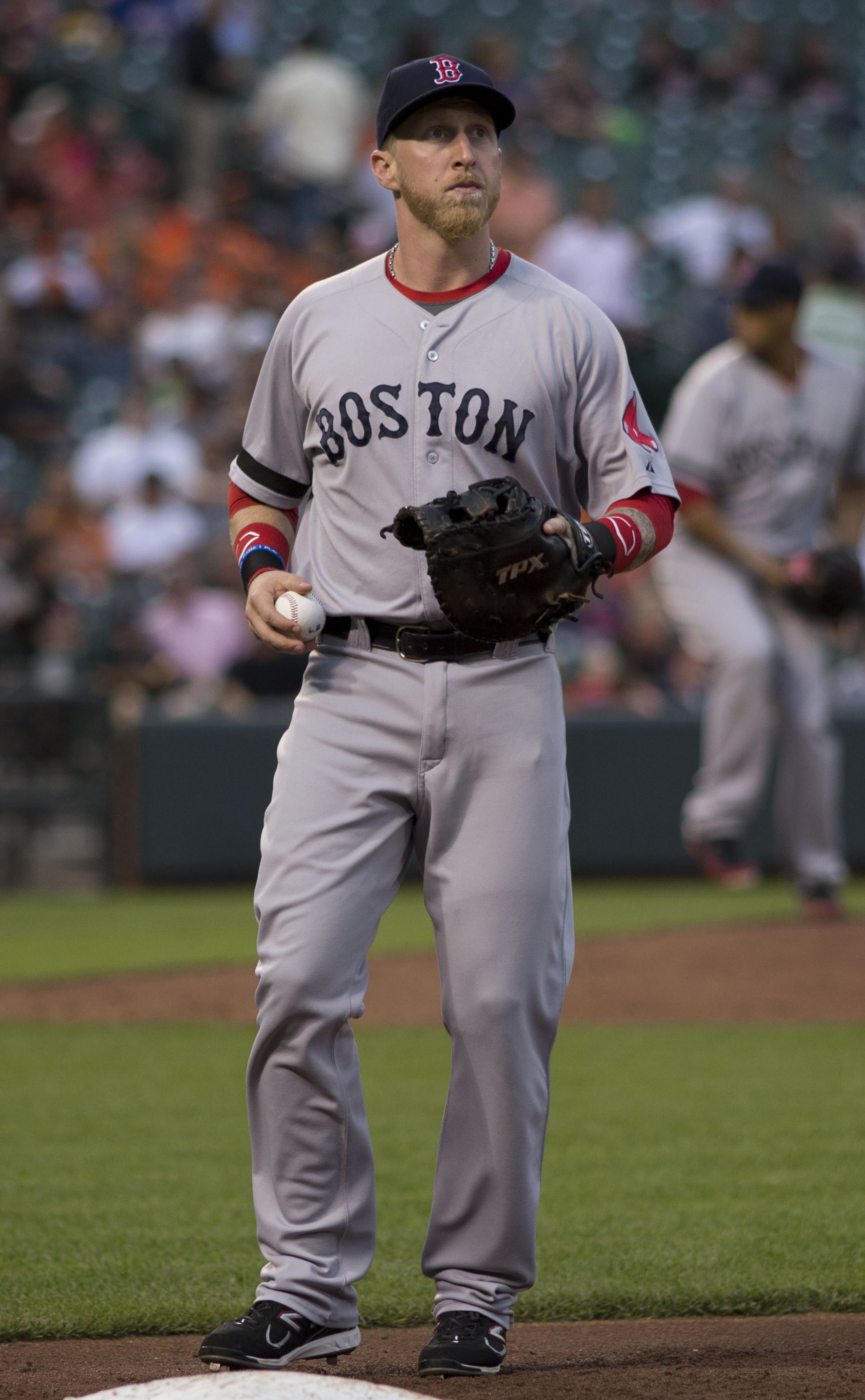 Mike Carp